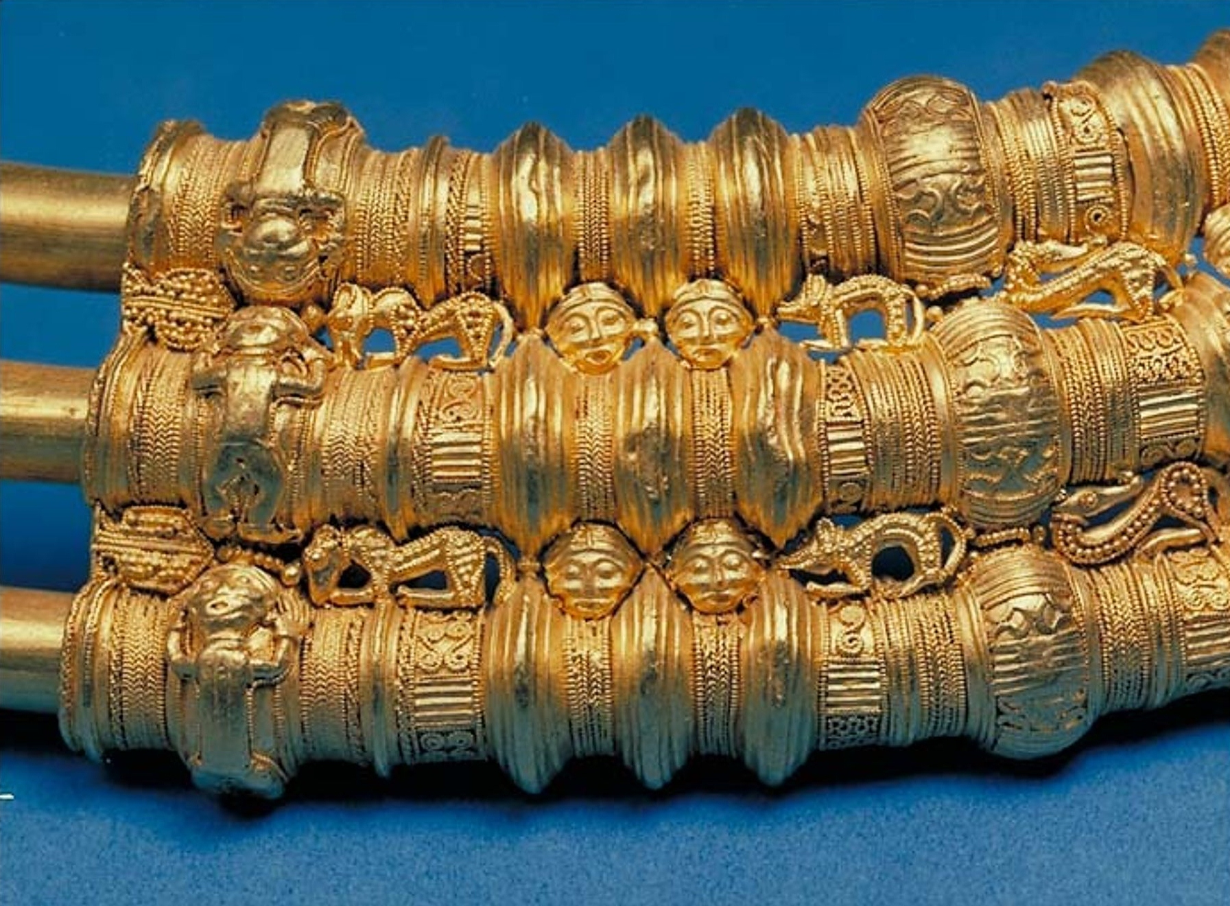 Ållebergskragen (detalj). Statens historiska museum, inventarienummer 492.